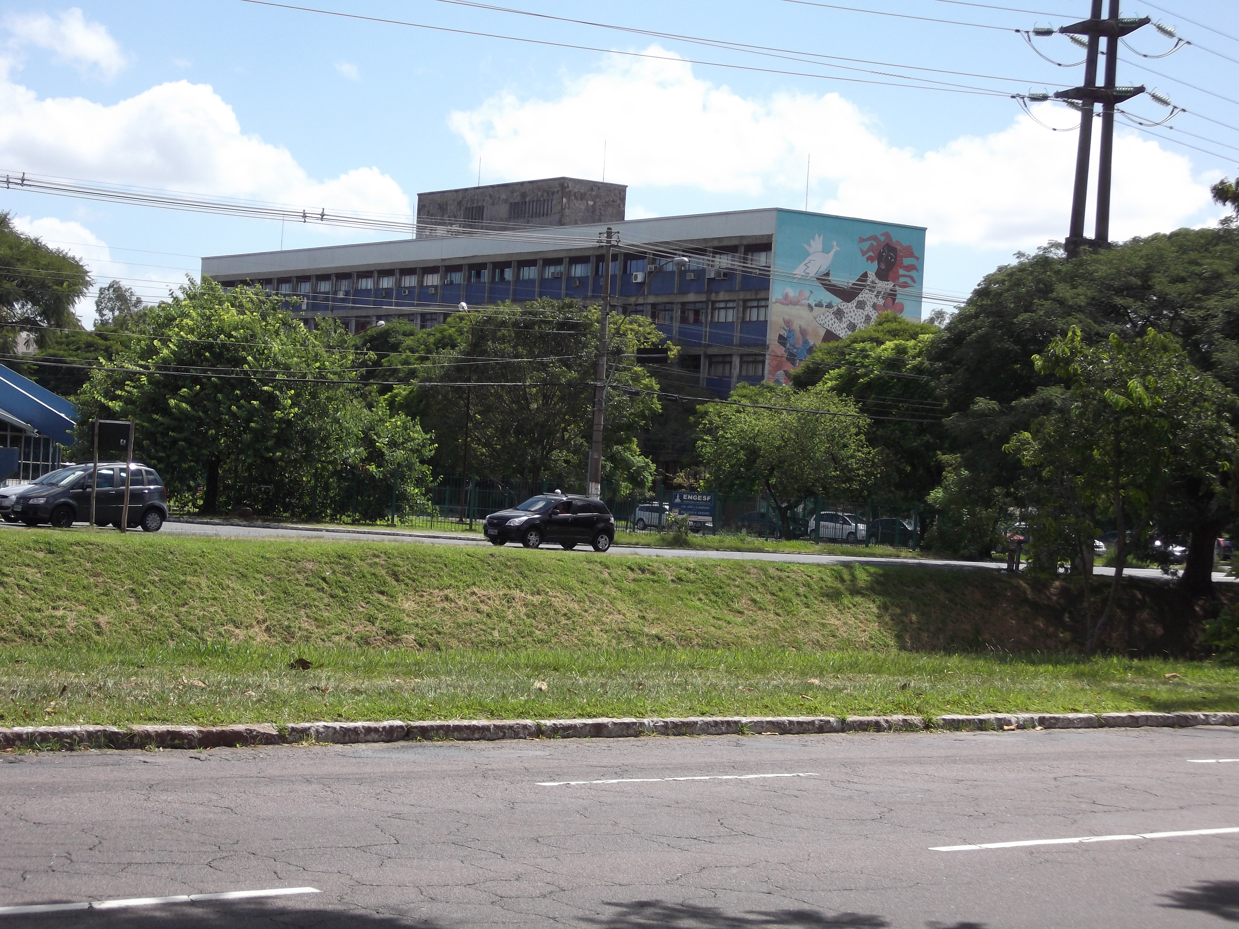 Instituto de Psicologia da Universidade Federal do Rio Grande do Sul